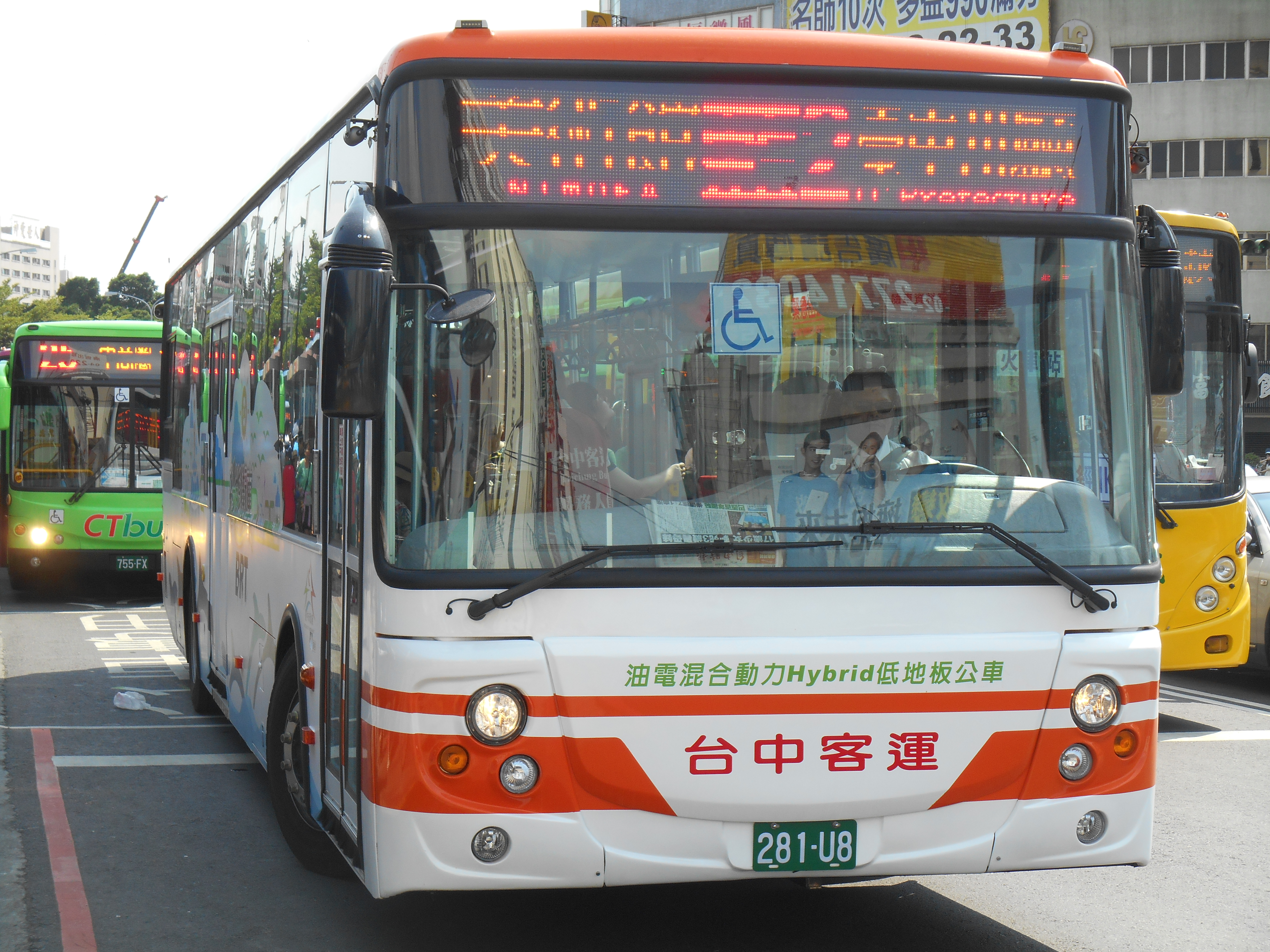 2014(2014)FOTON BJ6123（EATON 油電混合動力）